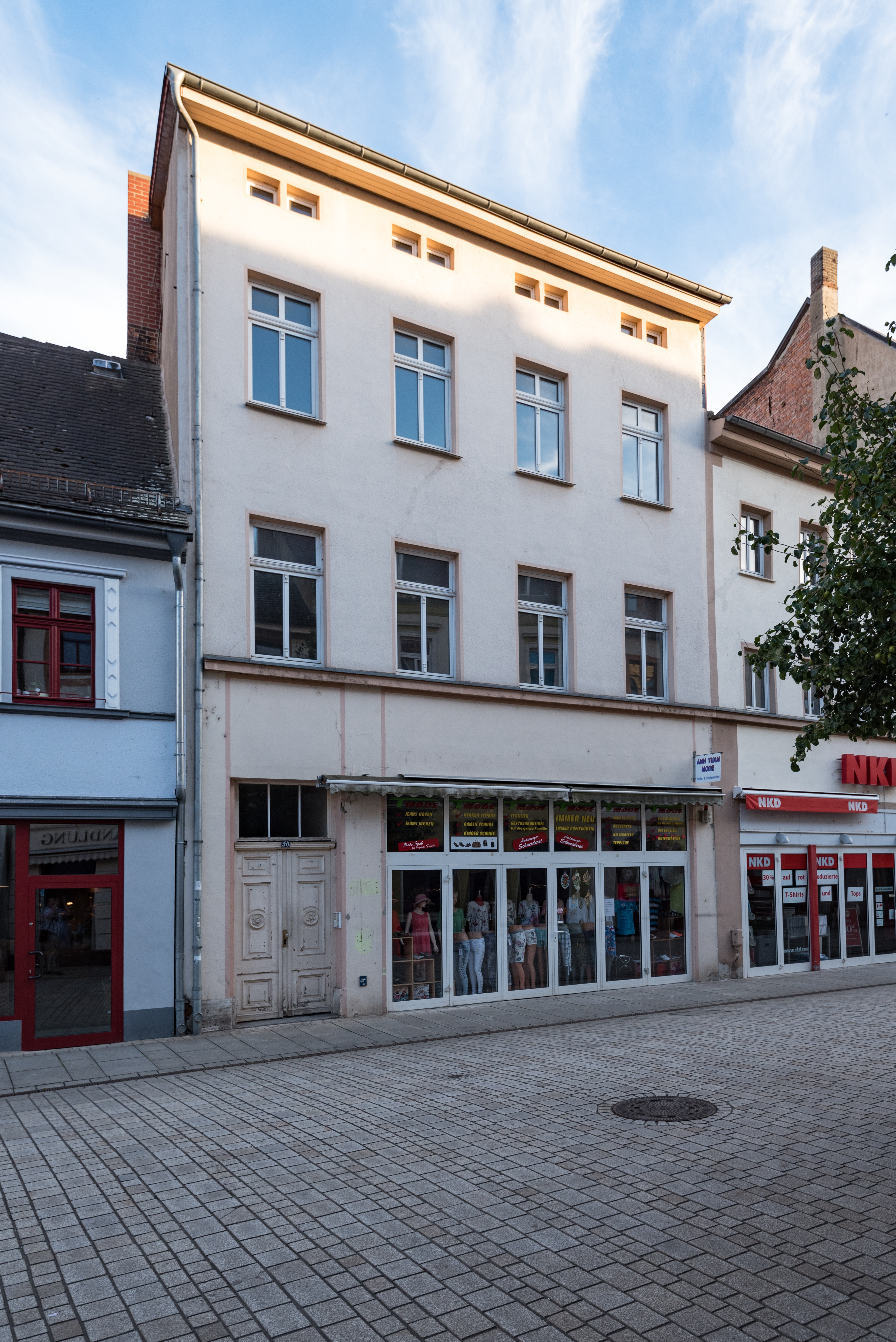 Weißenfels, Jüdenstraße 30